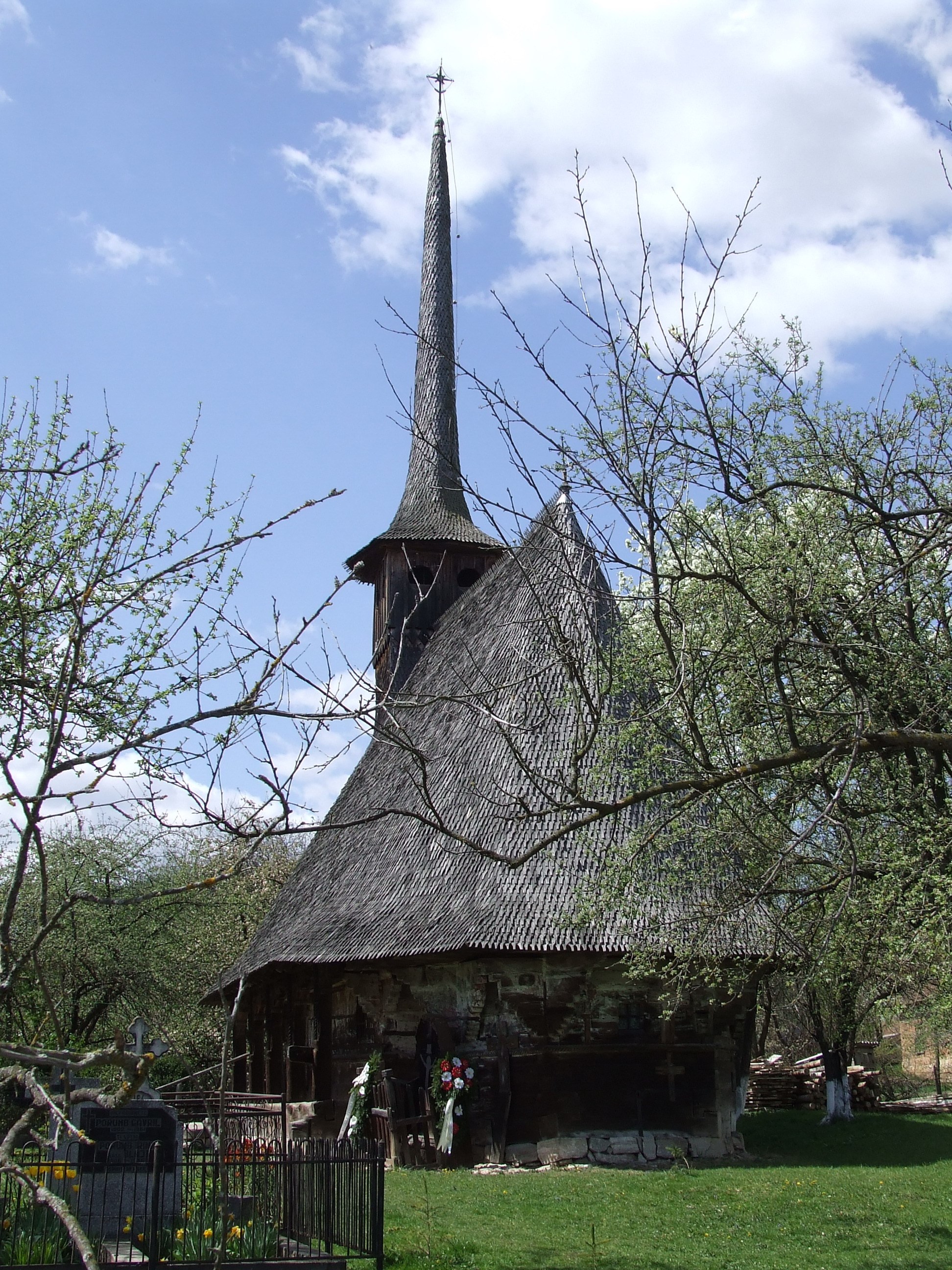 Biserica de lemn din Păuşa, Sălaj. Autor: Bogdan Ilieş Data: aprilie 2007